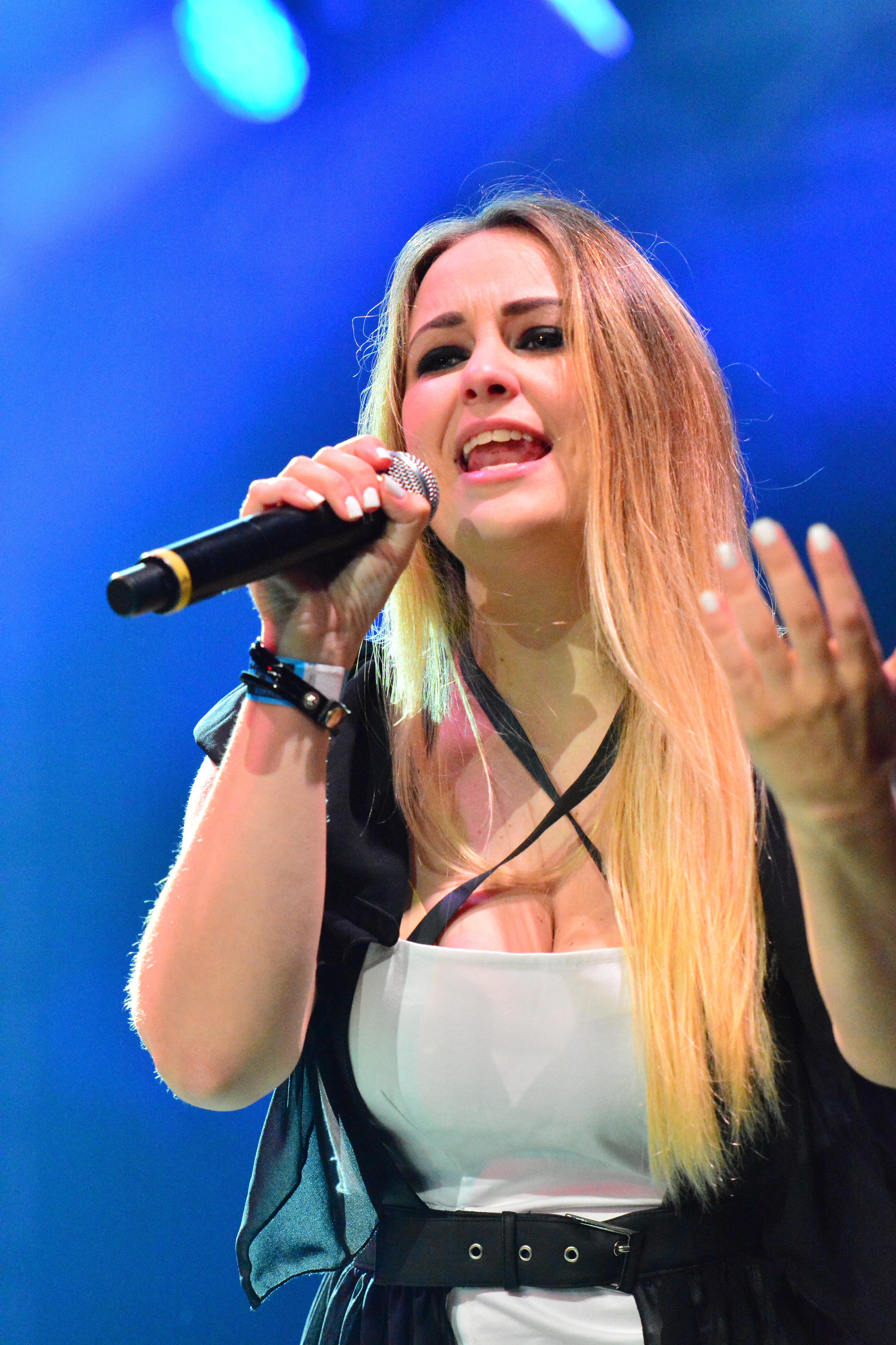 Ancient Bards beim Wacken Open Air 2015